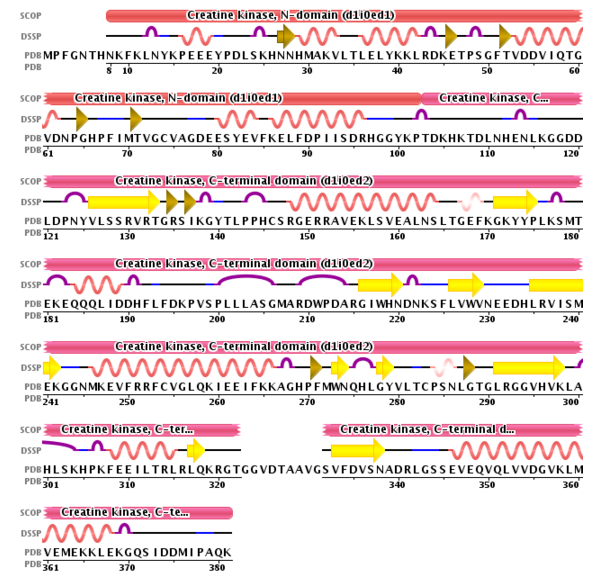 sequence chain of mm-ck